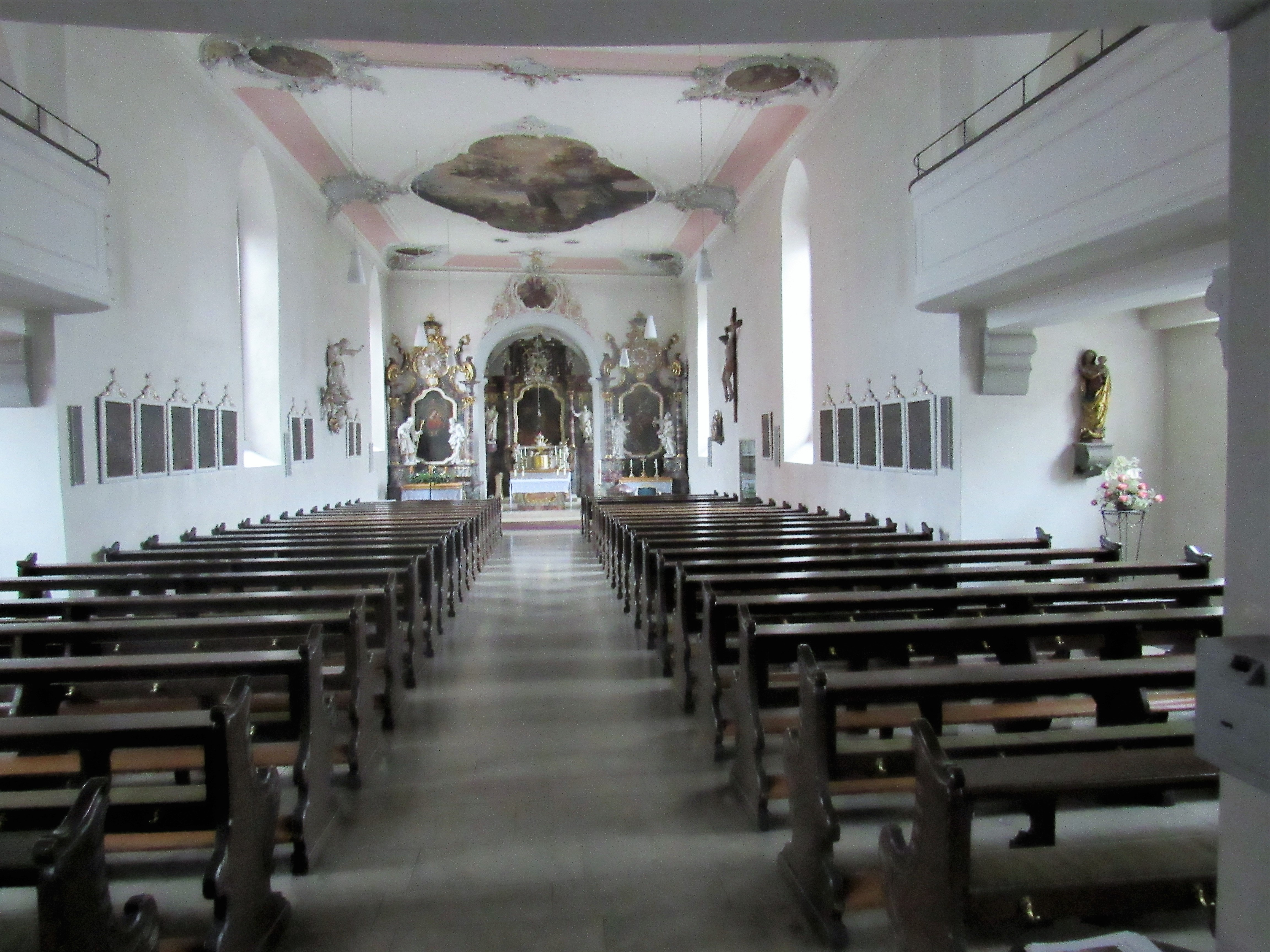 Innenraum der Kirche von Burglauer